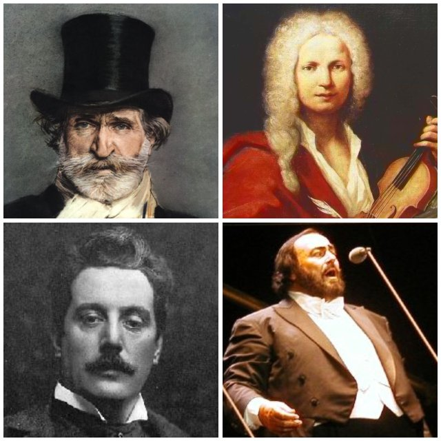 Collage di quattro foto su musicisti italiani.